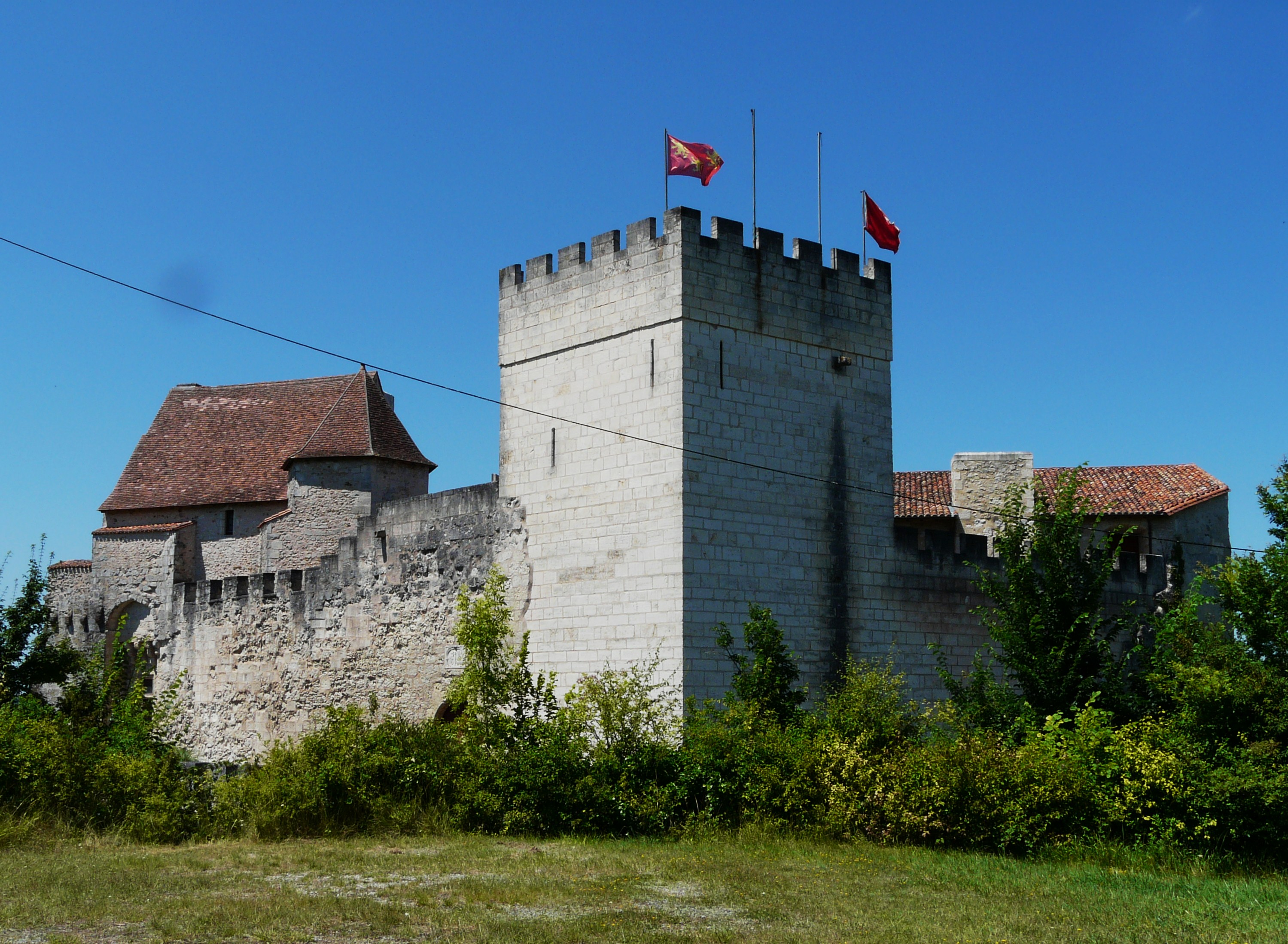 Château de Grignols (Dordogne) Object location45° 04′ 53.2″ N, 0° 32′ 36″ E .